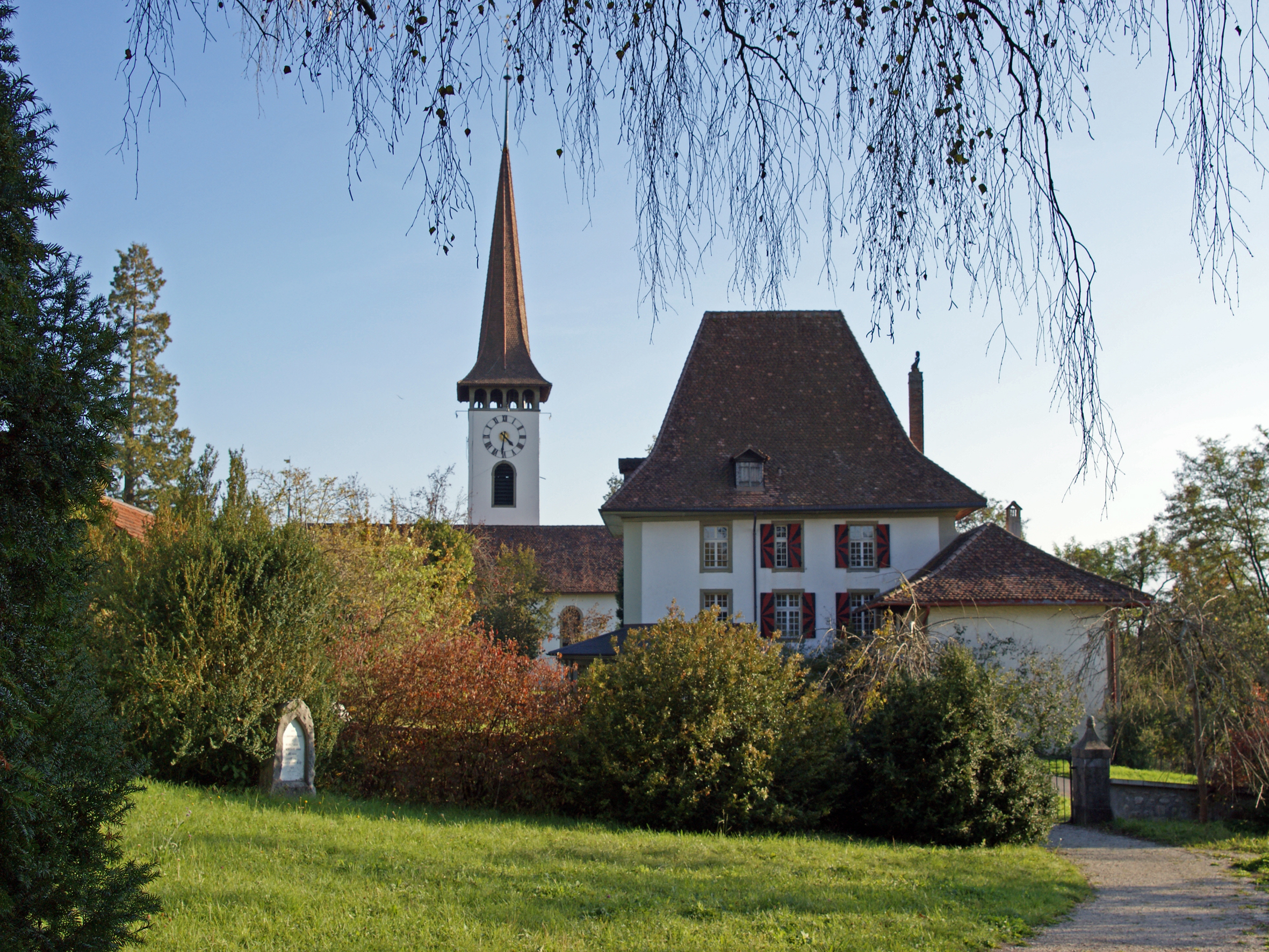 Pfarrhaus mit Kirche Münsingen Schweiz